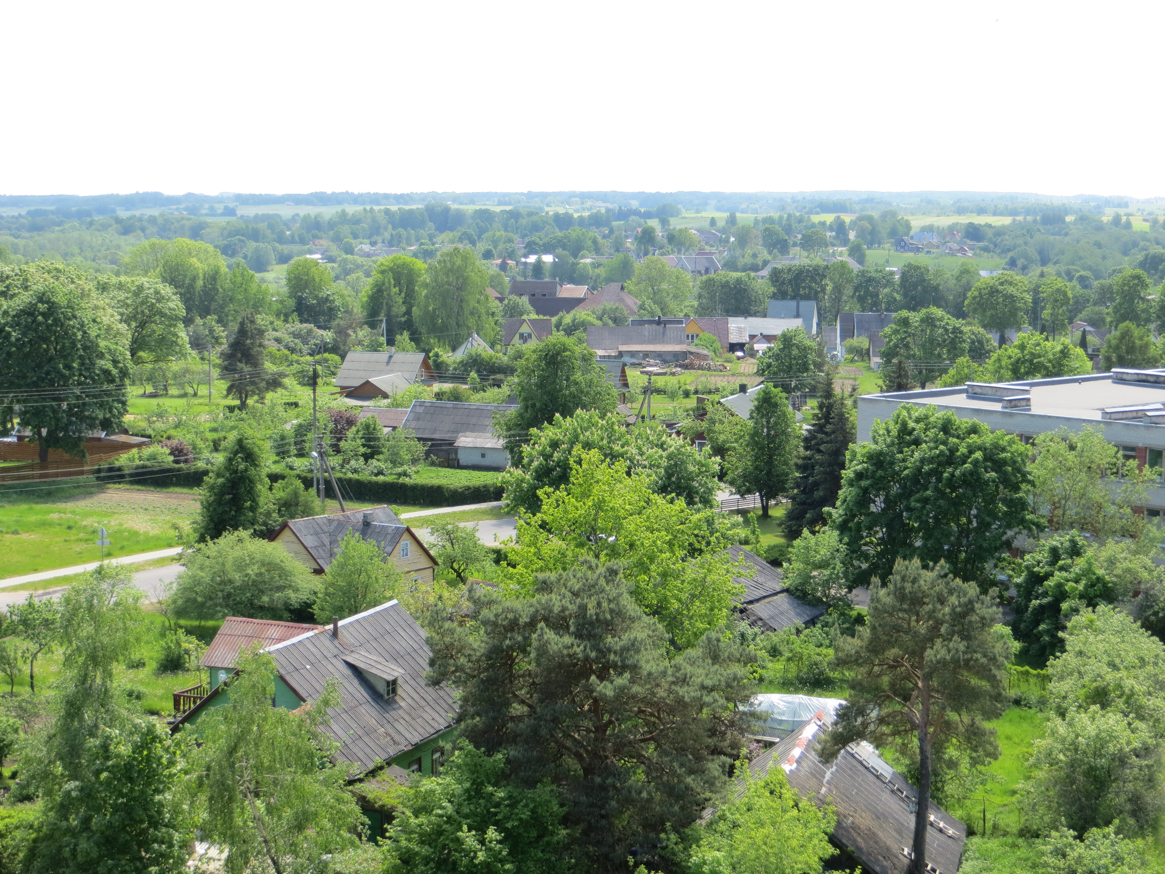 Vyžuonos, Lithuania